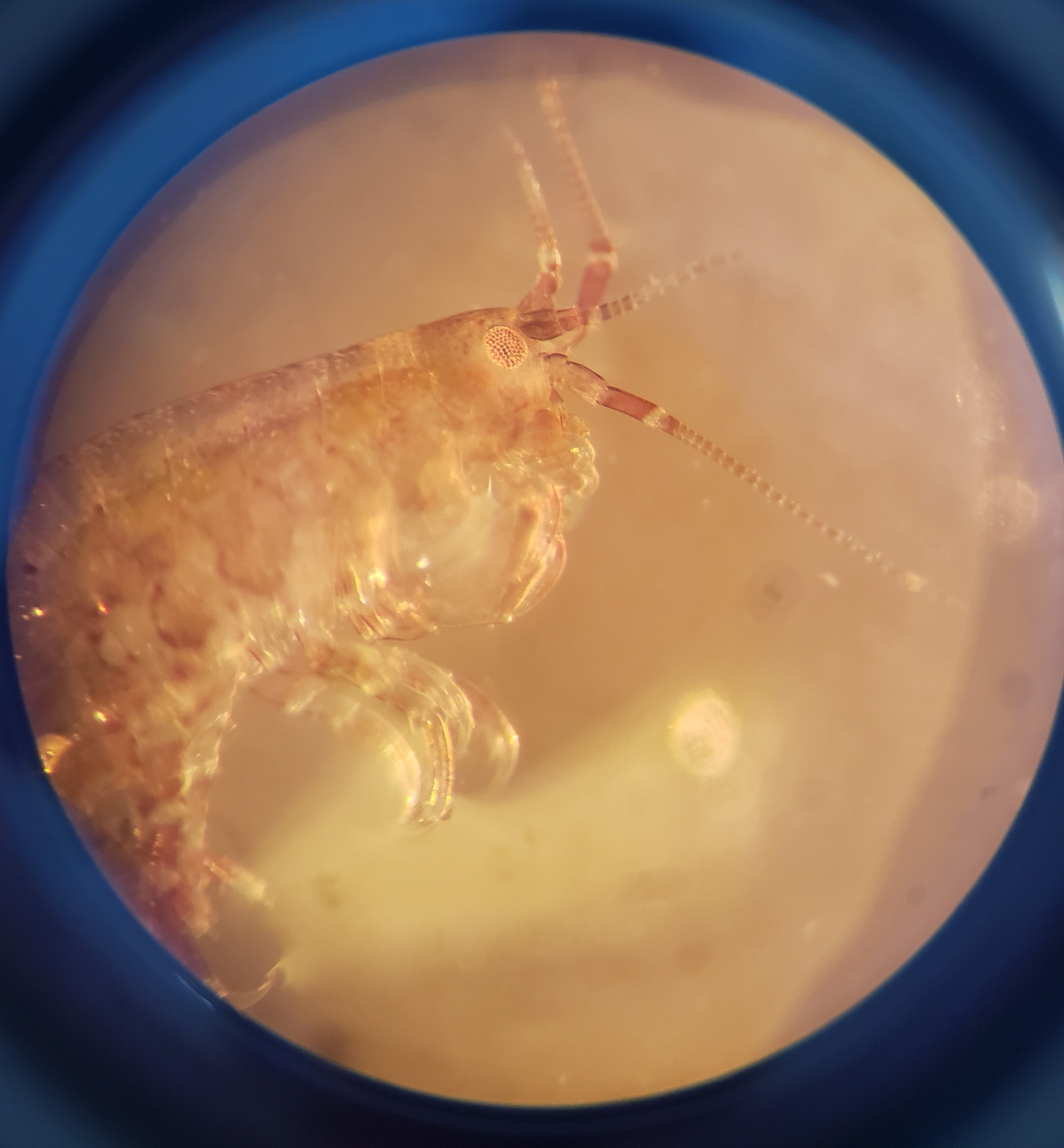 Visualização sob lupa focada nos olhos e antenas de um anfípode